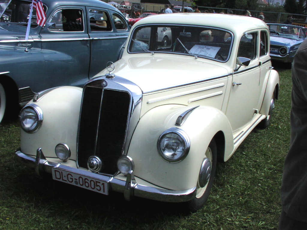 Mercedes 220 (W 187)